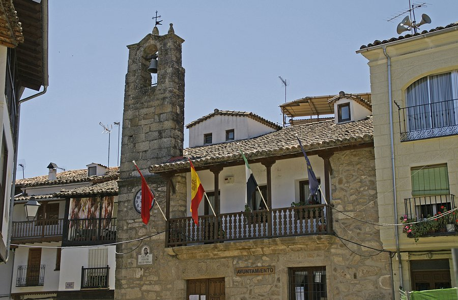 Casa consistorial o ayuntamiento